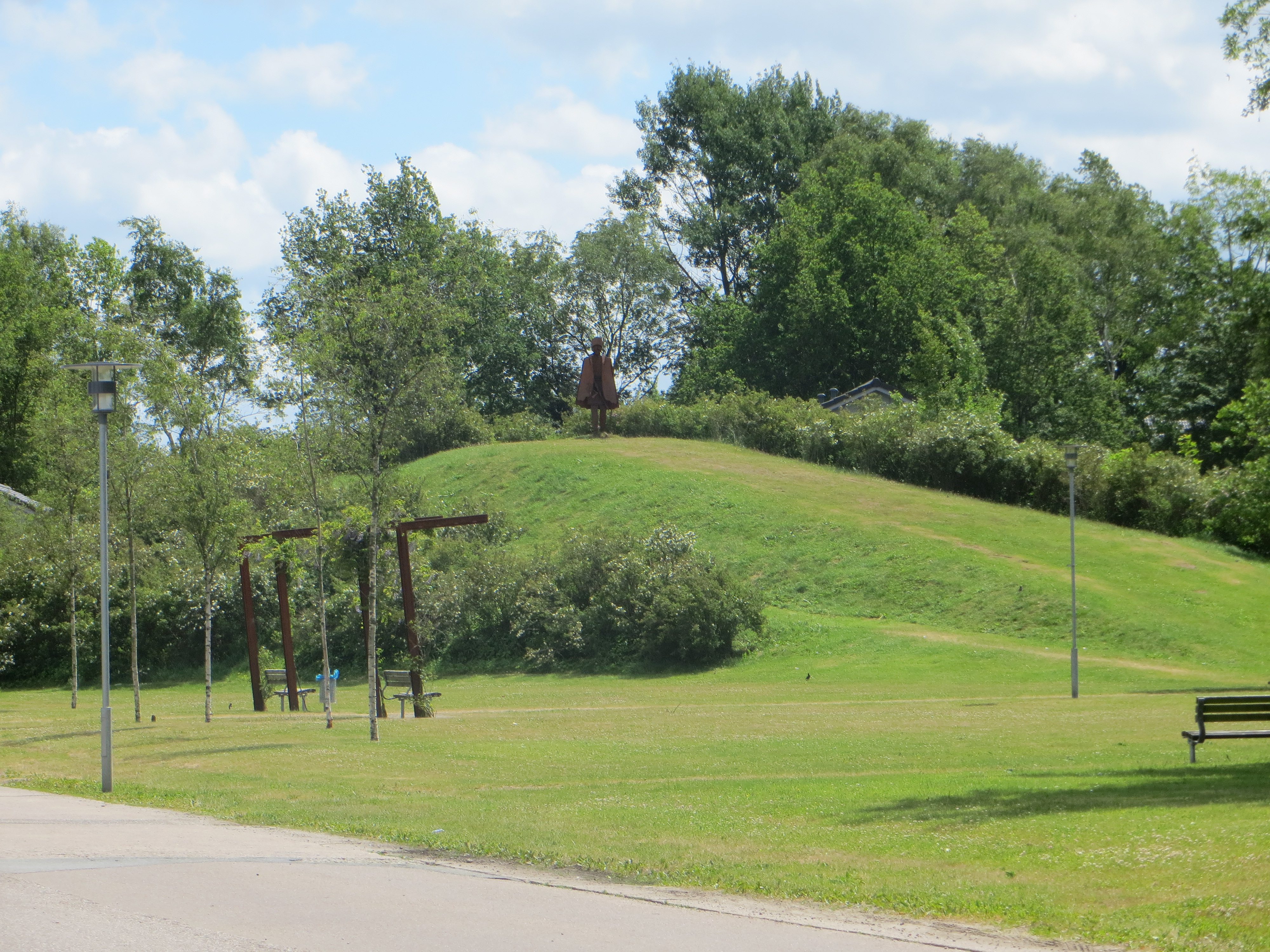 Kong-Arrild-Hügel in der Gartenstadt 2013; jedoch nicht der richtige der weiter nördlich im Stifutngsland liegt